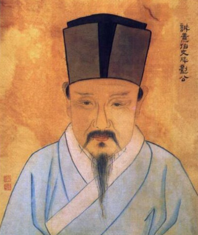 劉基（1311年7月1日－1375年5月16日），字伯溫，浙江青田人，祖籍陝西保安（志丹），南宋抗金將領劉光世的後人。元末明初軍事家、政治家及詩人，通經史、曉天文、精兵法。他以輔佐明太祖朱元璋完成帝業、開創明朝並保持國家安定，因而馳名天下，被後人比作為諸葛武侯。朱元璋多次稱劉基為：「吾之子房也。」授資善大夫、上護軍，封誠意伯。正德時追贈太師，諡文成。